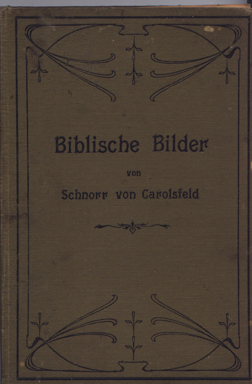 Einband des Buchs Biblische Bilder zum Alten und neuen Testament von Julius Schnorr von Carolsfeld, Berlin 1903